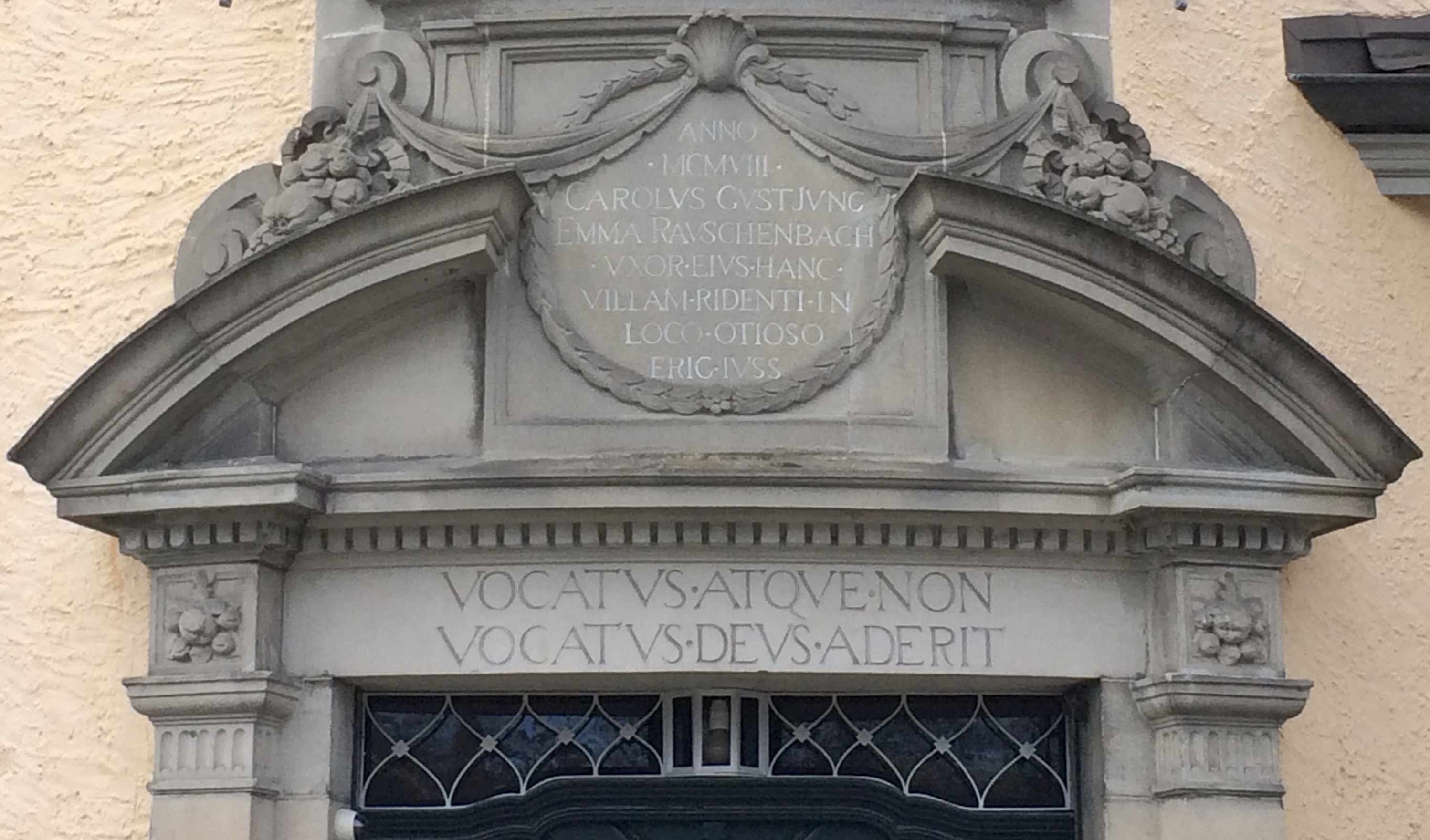 Wohnhaus von C.G. Jung: Inschriften oberhalb der Eingangstüre.